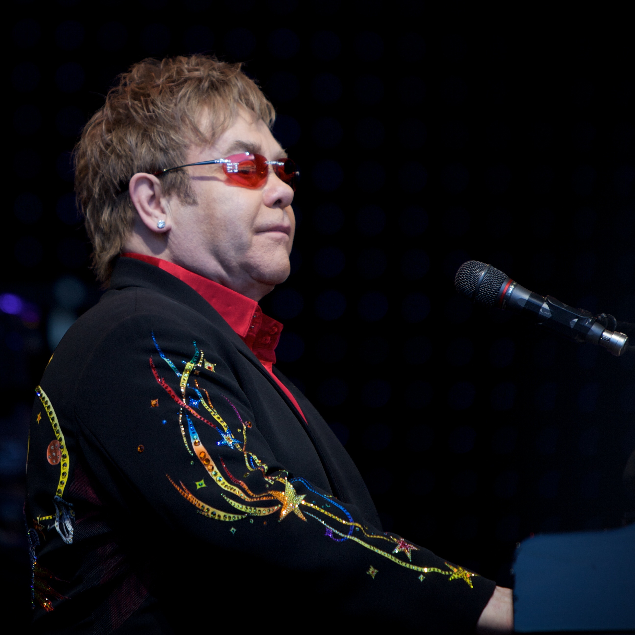 Skagerak Arena, Skien, June 20th 2009